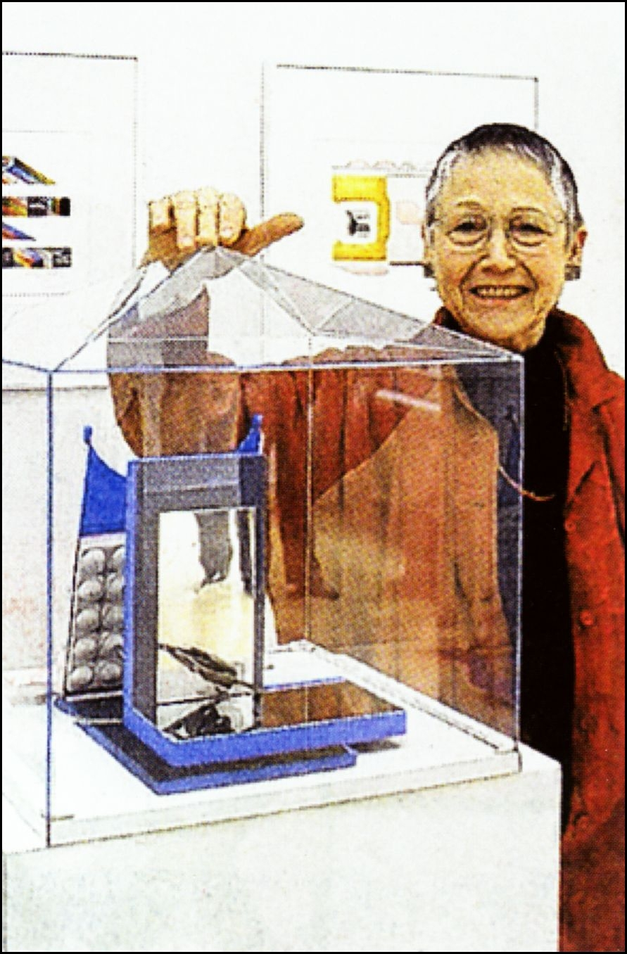 Ursula Laquay-Ihm vor einem ihrer Objekte, 2008.